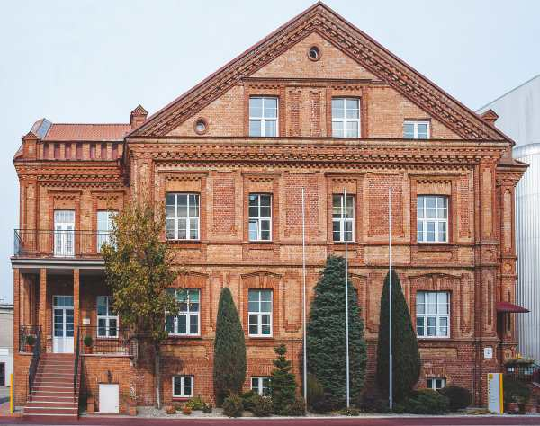 Budynek Browaru Dojlidy